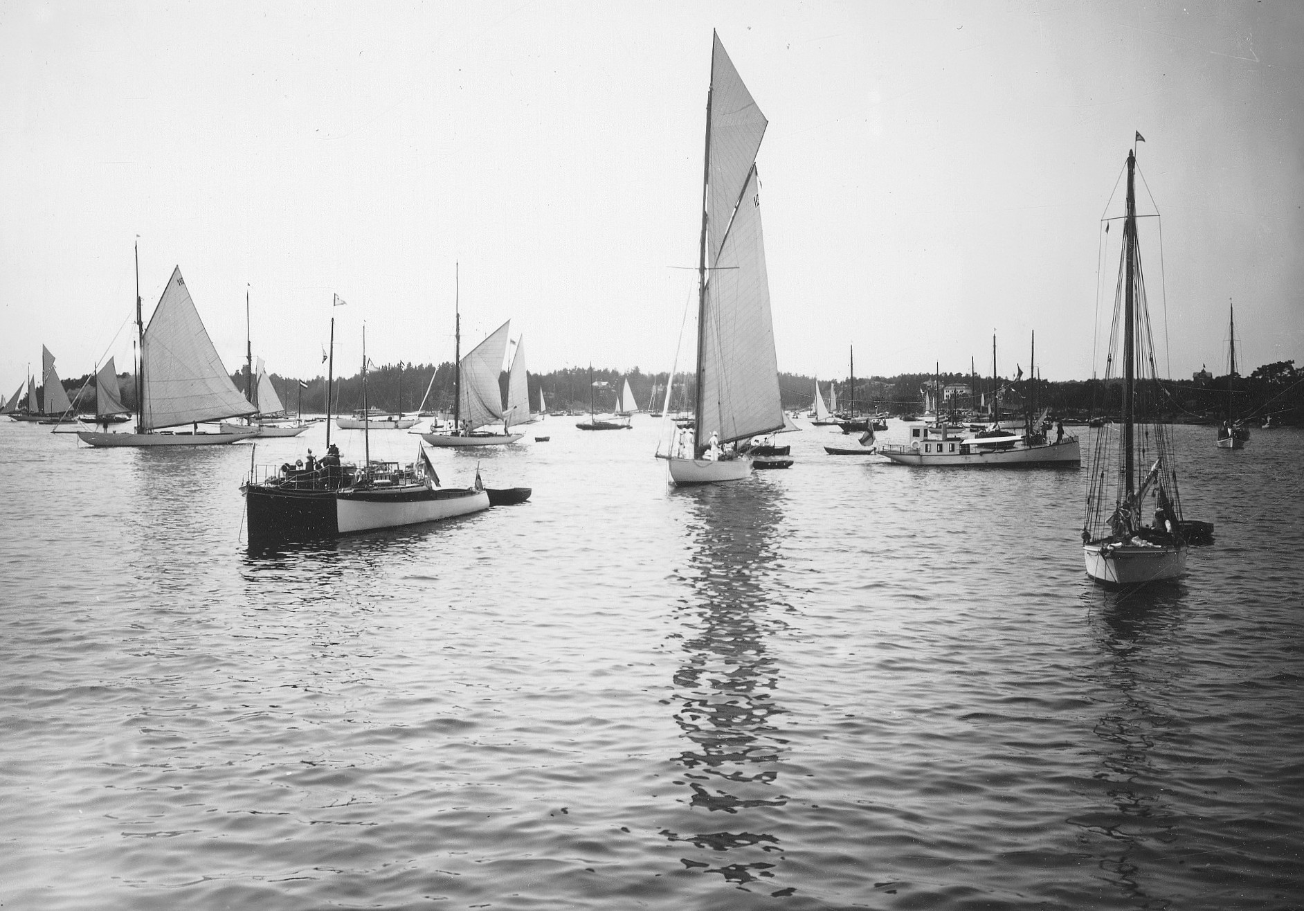 Seglingar på Gårdsfjärden Nynäshamn, Olympiska sommarspelen, segling